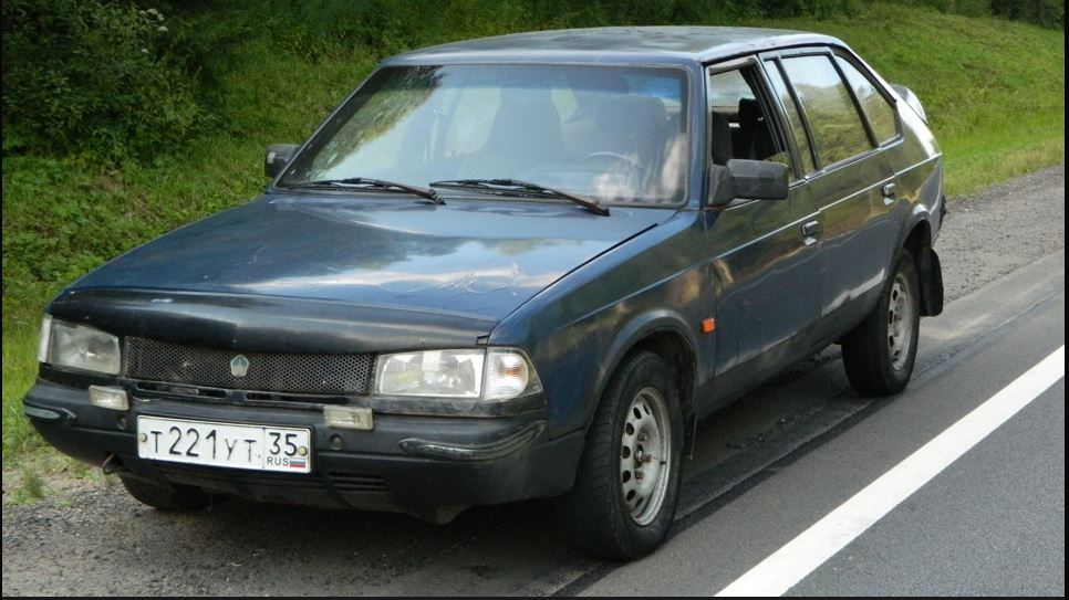 Москвич 2141 Юрий Долгорукий модель 2141Y2 последних партий (решетка радиатора и логотип заводские). 2014 год, лето.